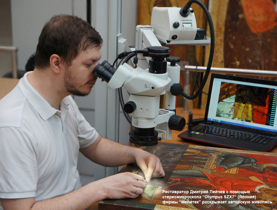 Раскрытие тихвинской иконы XVI века с помощью стерео микроскопа "Olympus SZX7". Фото 2014 года.